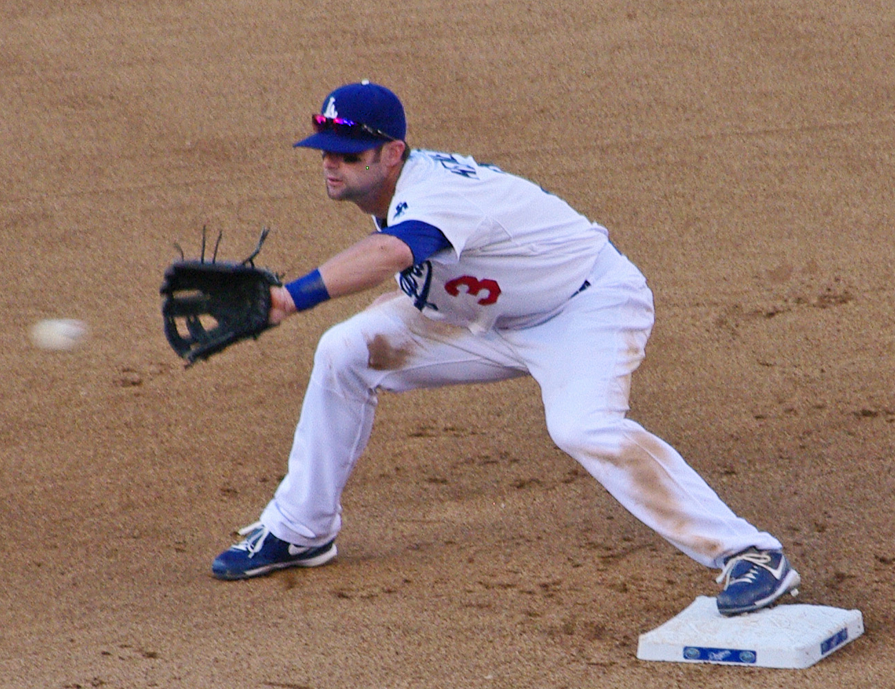 Adam Kennedy